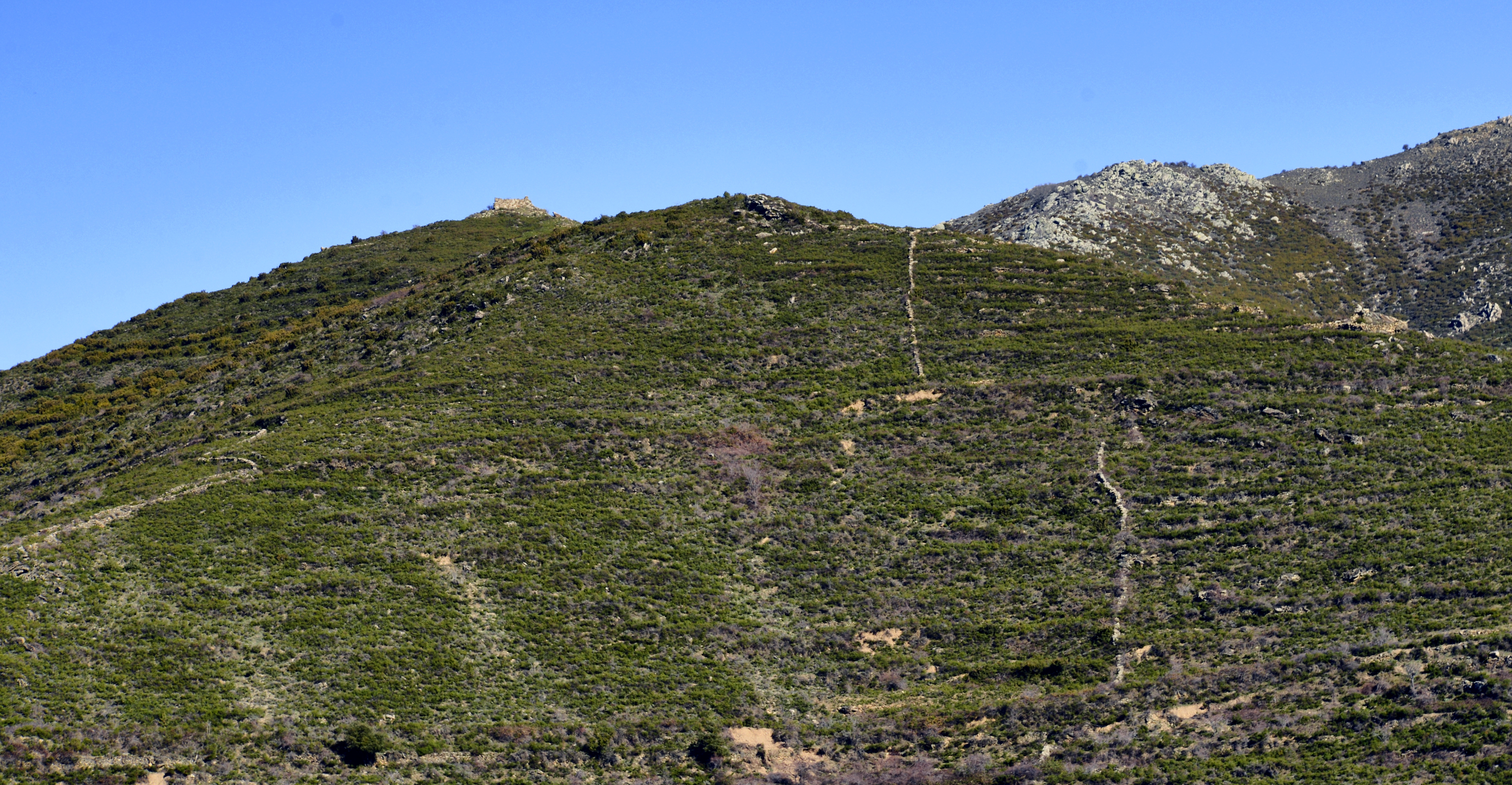 Santa-Lucia-di-Mercurio, Bozio (Haute-Corse) - Chapelle Santa Servanda ruinée, construite à 1043 mètres d'altitude au XVIe siècle (?). Les cultures en terrasse se faisaient jusqu'à ses pieds.